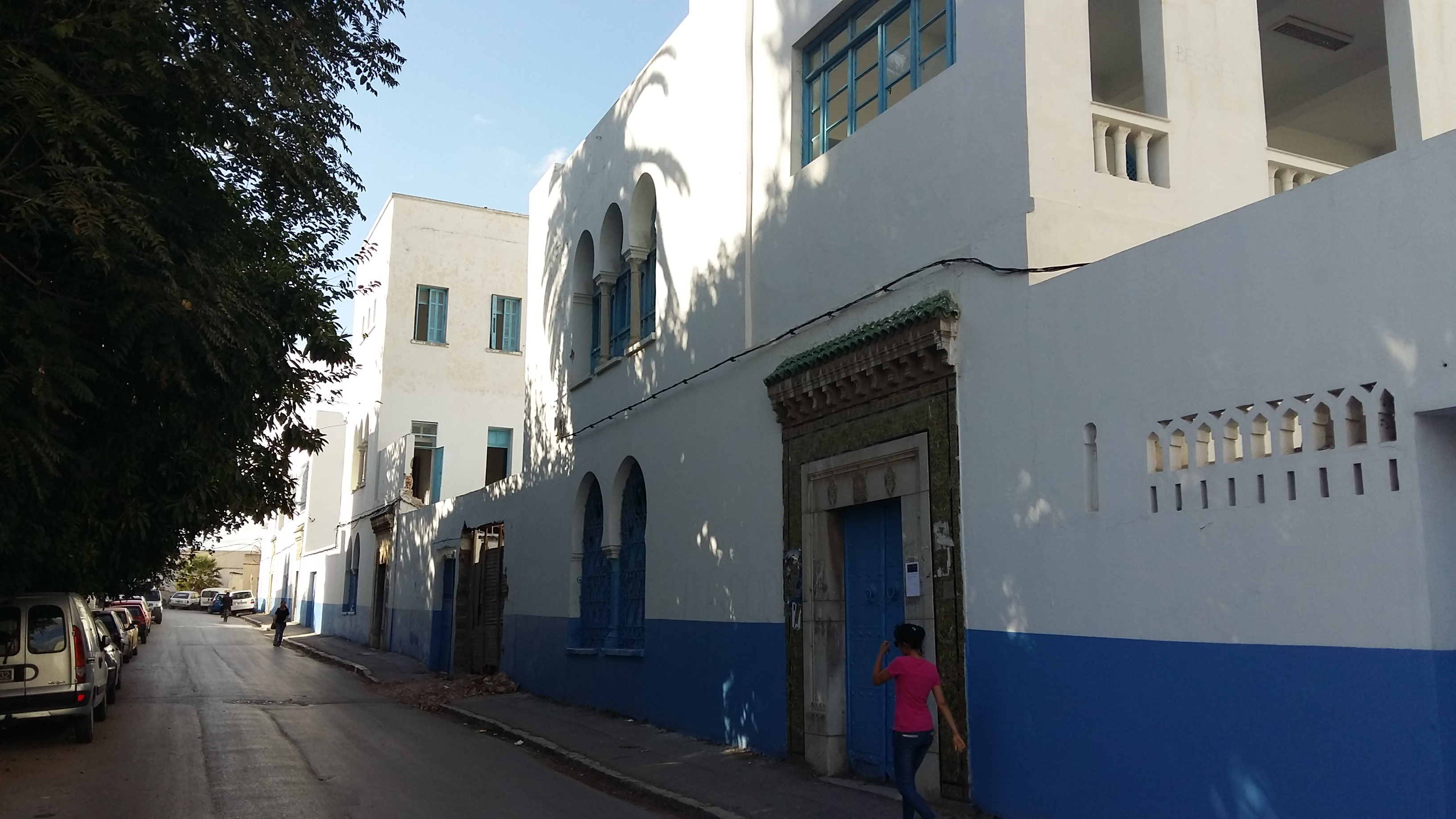 Collège Alaoui